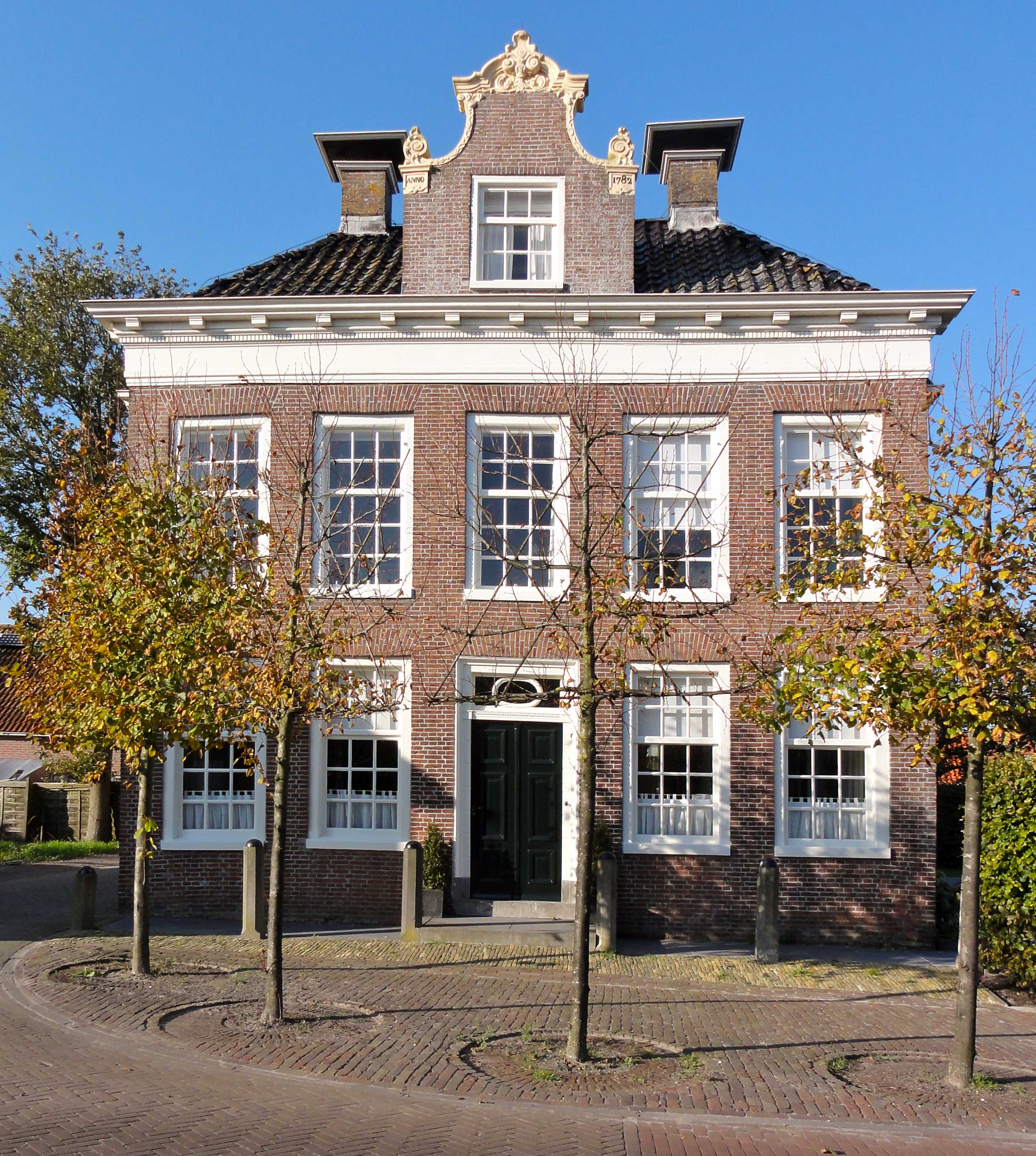 Voorzijde van het voormalig rechthuis "De Beverkooy" Buren 19 in Oosterzee